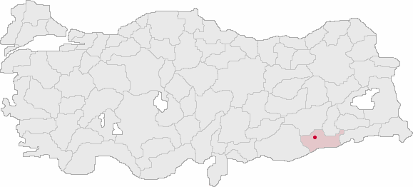 Bilge köyün Mardin ilinde konumu